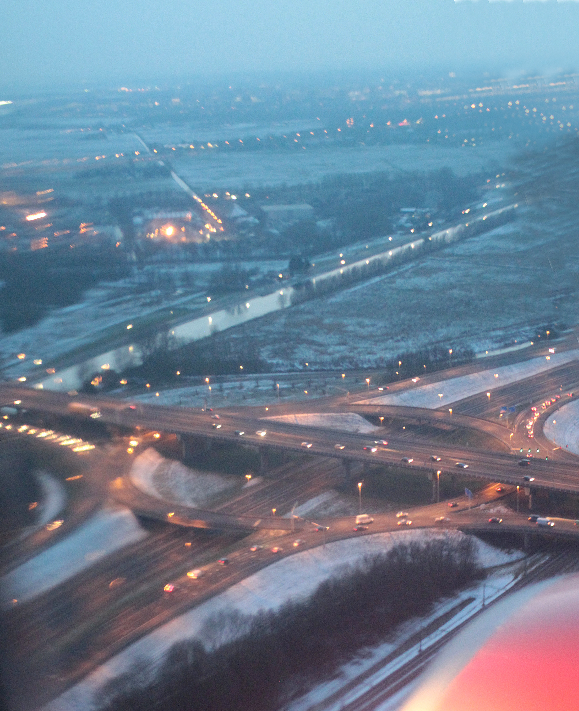 Knooppunt Rottepolderplein, gezien vanuit een 737 aanvliegend op de Polderbaan